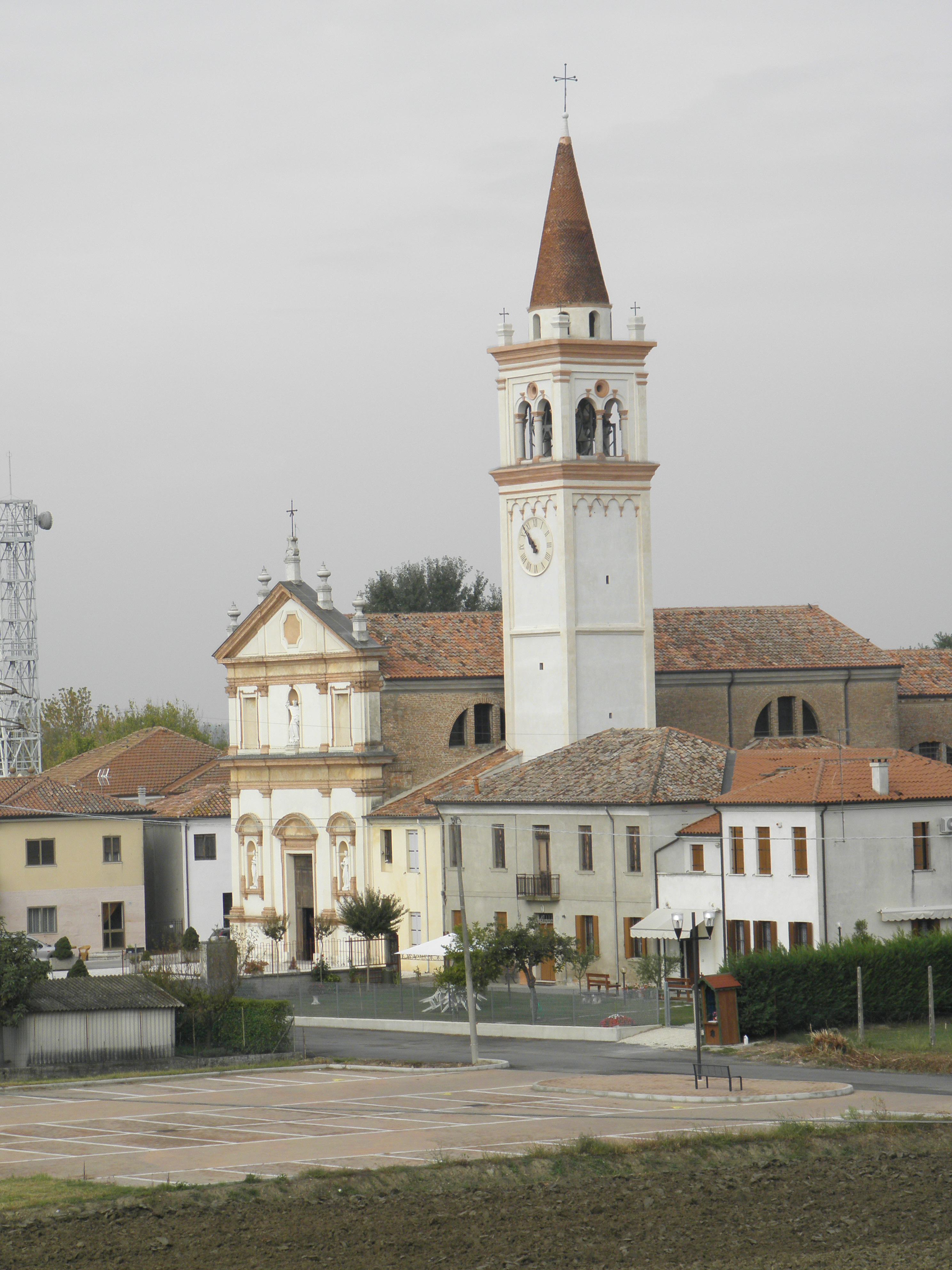 Chiesa Parrocchiale di San Domenico, situata a Guarda Veneta, provincia di Rovigo. Vista dall'argine del Po.